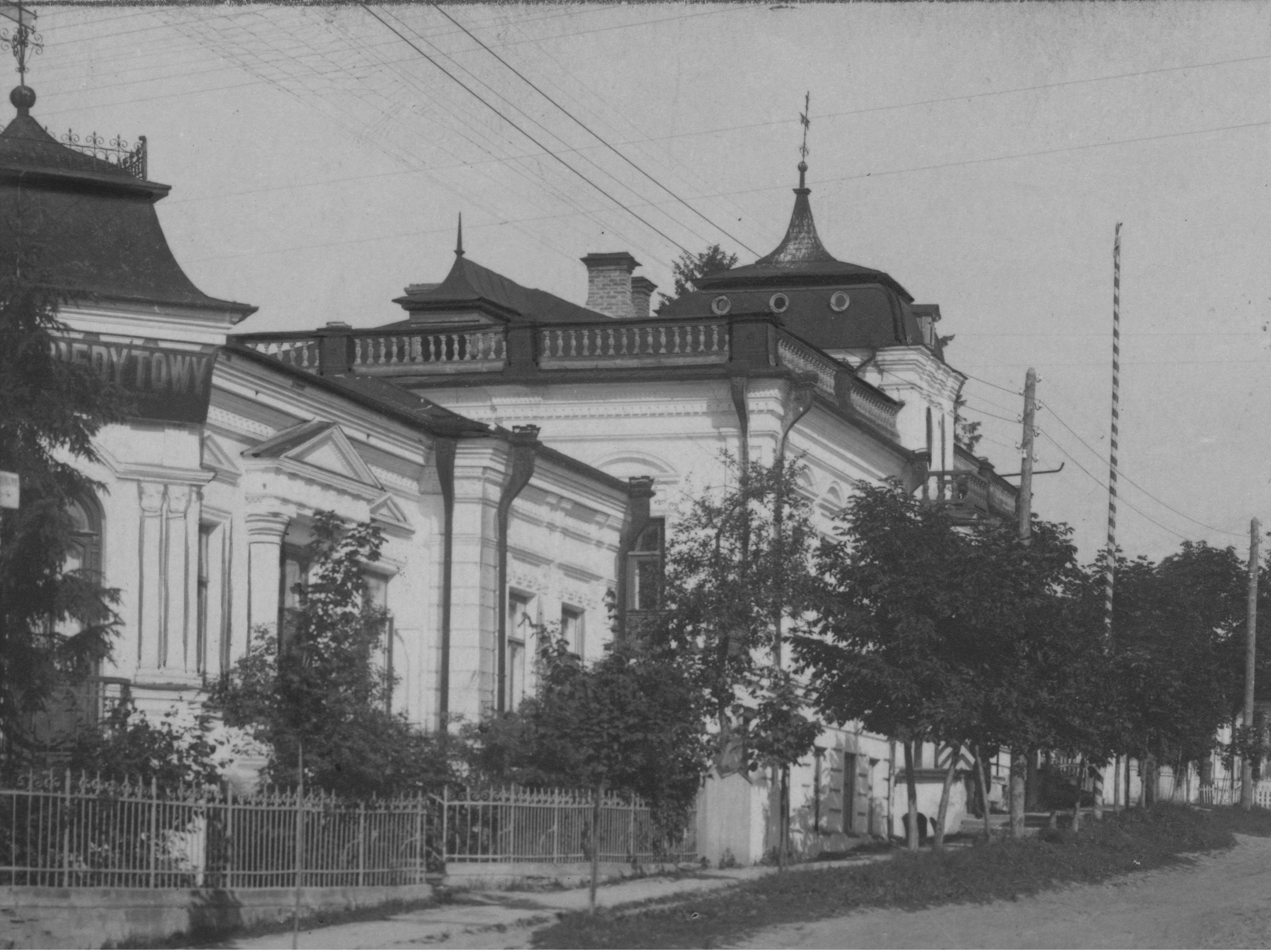 Budynek dowództwa Batalionu Korpusu Ochrony Pogranicza "Ostróg" (dawna siedziba starostwa) przy ul. Starościńskiej w Ostrogu; 1932 r. Koncern Ilustrowany Kurier Codzienny - Archiwum Ilustracji. Sygnatura: 1-W-1792